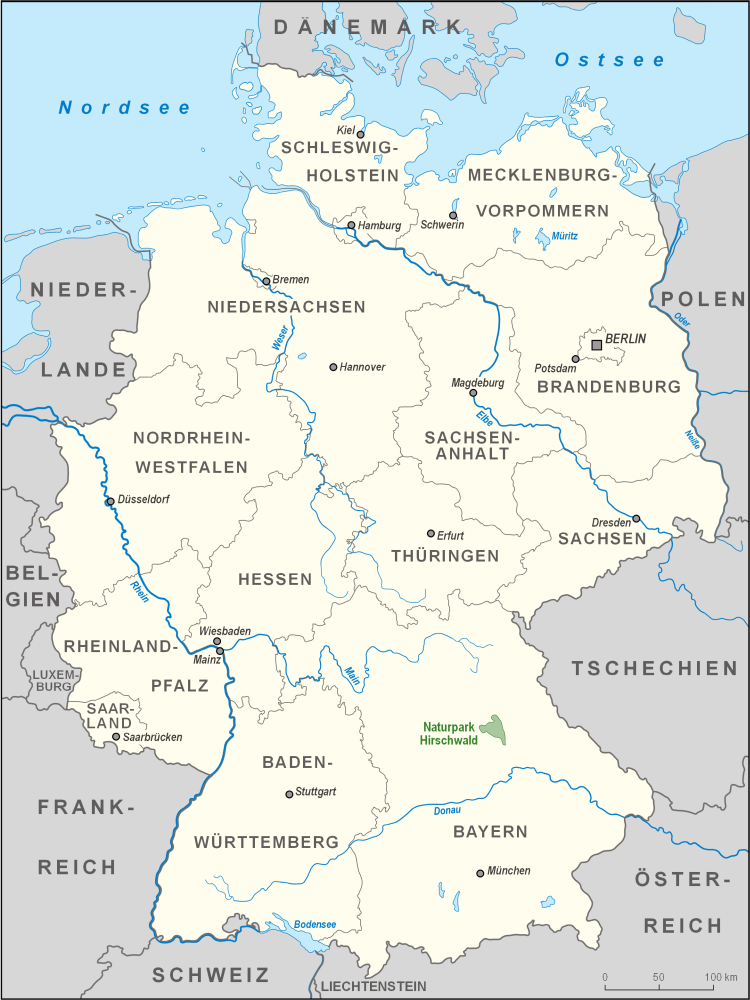 Karte des Naturparks Hirschwald in Deutschland